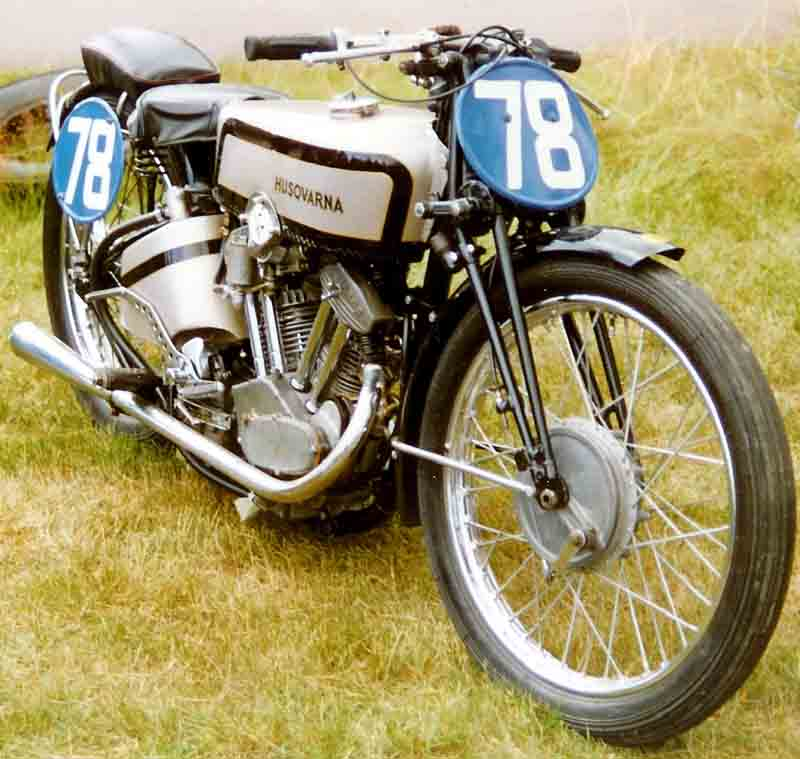 Husqvarna 350 cc TV Racer 1934